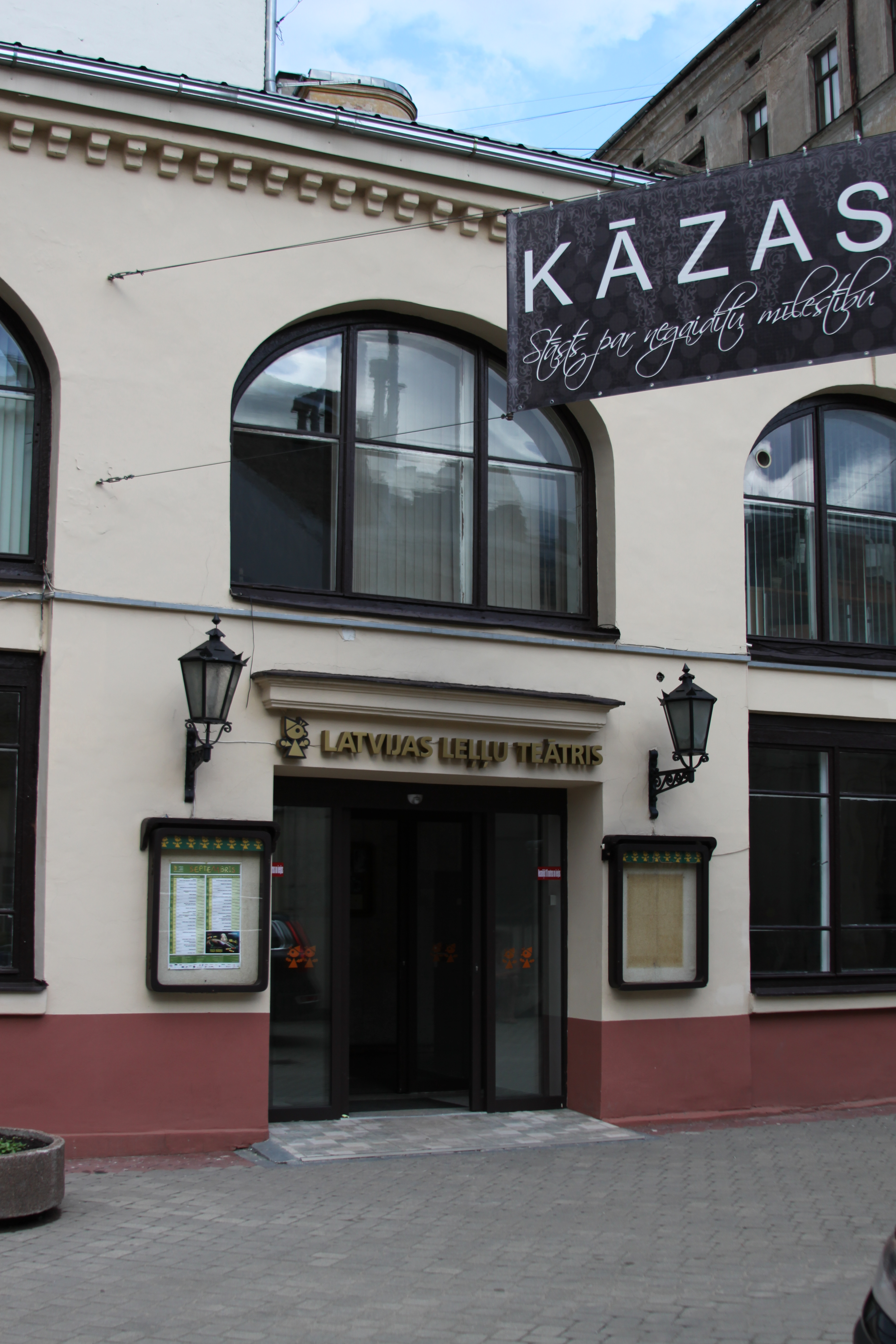 Фото здания Латвийского театра кукол